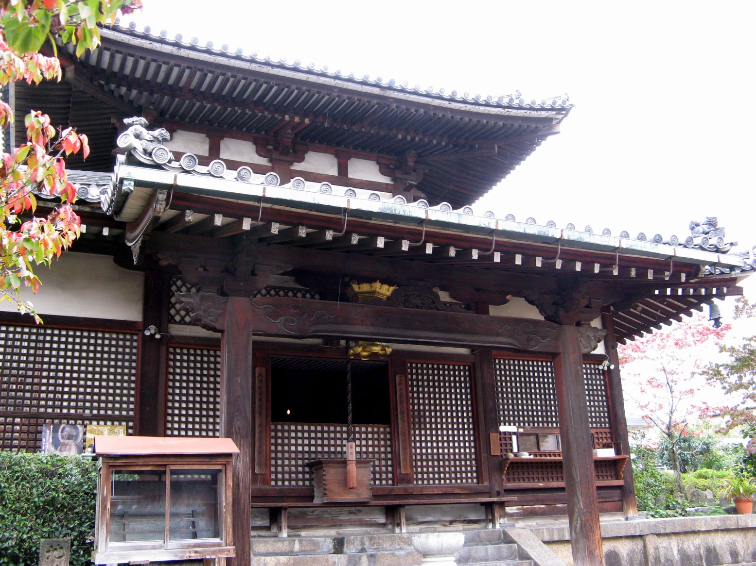 福智院本堂（重要文化財）